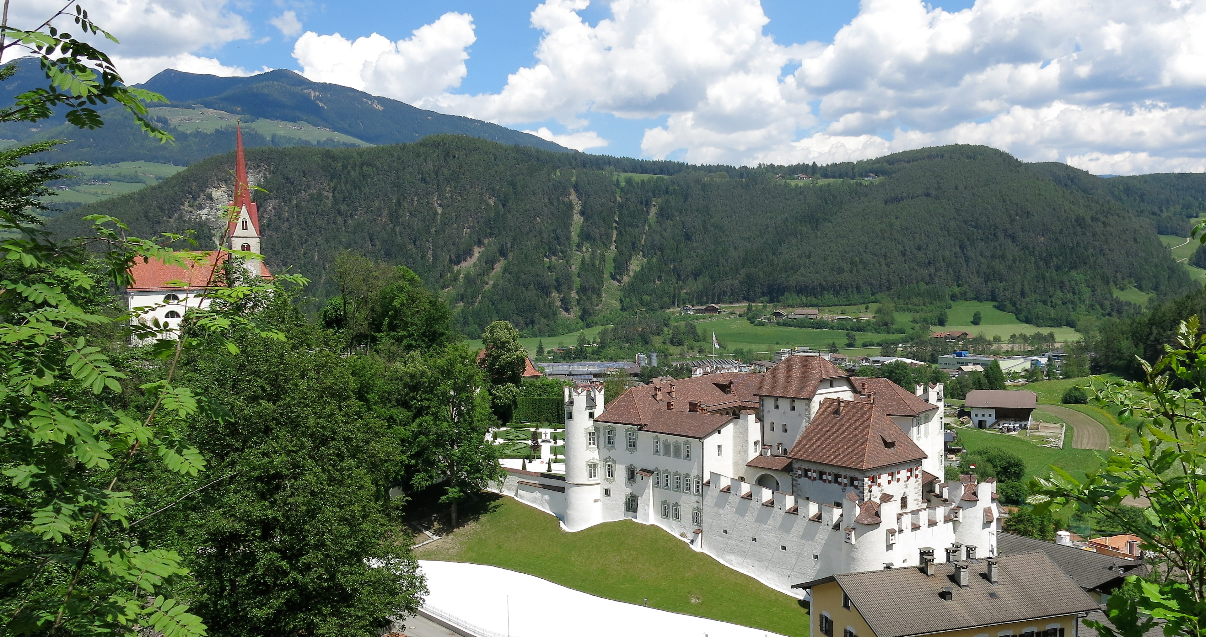 Schloss Ehrenburg und die Wallfahrtskirche "Maria Himmelfahrt" in Südtirol (Gemeinde Kiens) im Mai 2017, Ansicht von Südosten